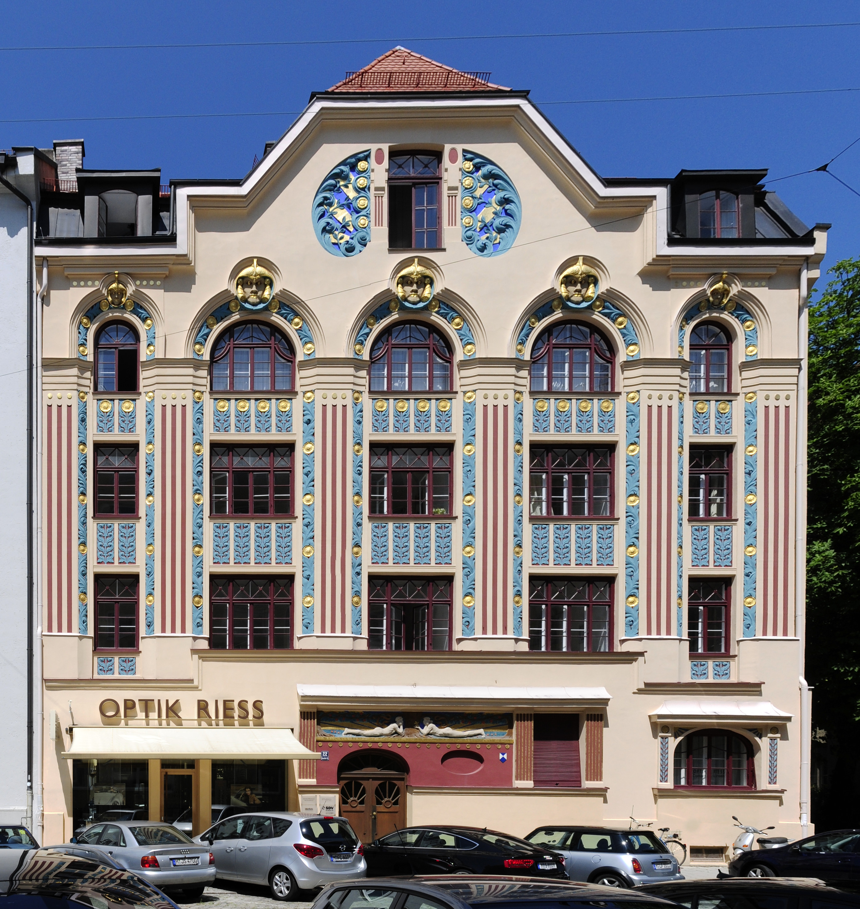 Siehe Dateiname